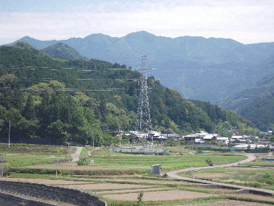 Template:旧久谷村の風景(南方向を望む) 中央の山は黒森山(1154m)